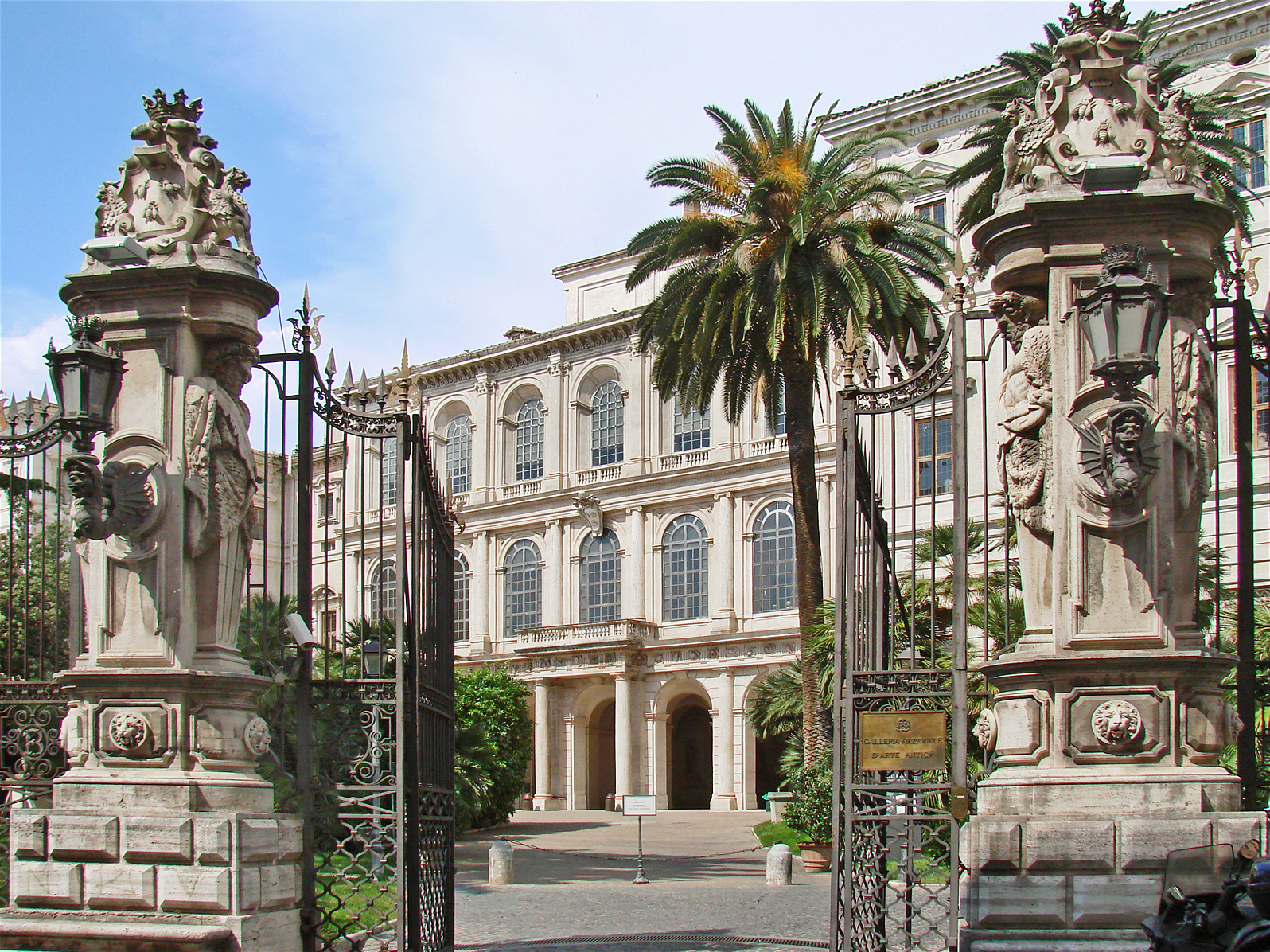 L'entrée du palais Barberini Le palais a été conçu en 1625 par Carlo Maderno, à la demande du Cardinal Maffeo Barberini, devenu Pape en 1623 sous le nom d'Urbain VIII. La forme du bâtiment est celle d'une vaste villa avec deux ailes en H qui s'avancent dans des jardins. A la mort de l'architecte, Le Bernin reprend les travaux en collaboration avec Francesco Borromini. Les colonnes de la façade (Le Bernin) sont des trois ordres, dorique au rez-de-chaussée, ionien au premier étage, corinthien au deuxième étage, en pilastres. Le portique au rez-de-chaussée permet d'alléger l'allure du bâtiment. Les salles du premier étage ont toutes des plafonds peints dont celui du salon principal, oeuvre exceptionnelle pour sa taille et sa composition de Pierre de Cortone (Le Triomphe de la Divine Providence). Le palais accueille aujourd'hui la galerie nationale d'art ancien (Galleria nazionale d'arte antica) qui comprend des oeuvres très célèbres comme "La Fornarina" de Raphaël. Site officiel de la Galerie du palais Barberini